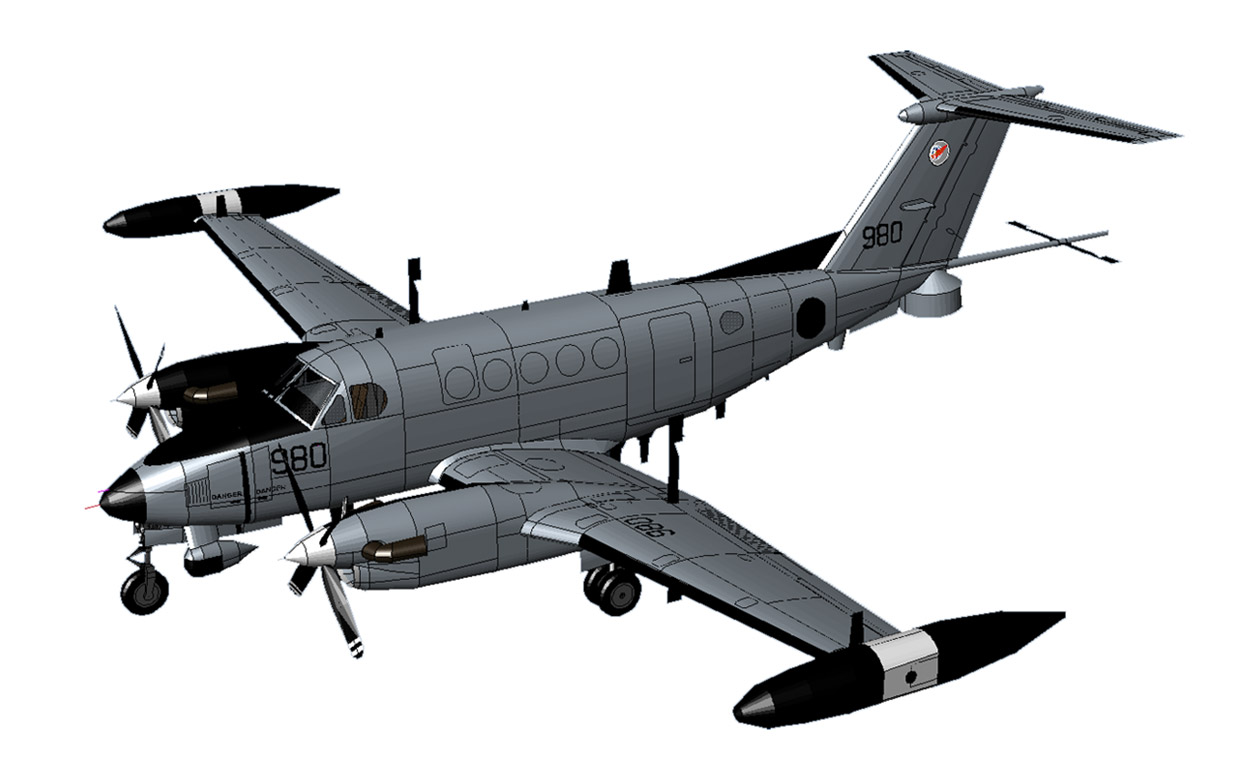 קליפארט קוקיה מספר 980